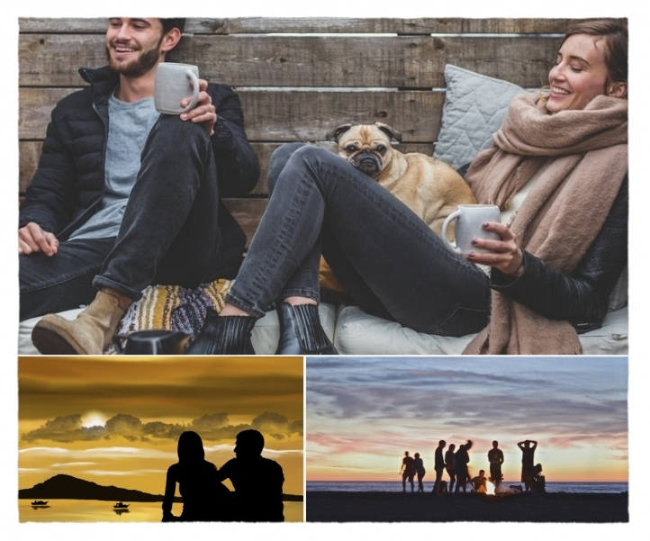 Imagen de personas teniendo relaciones